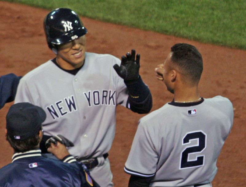 Derek Jeter (right) and Hideki Matsui